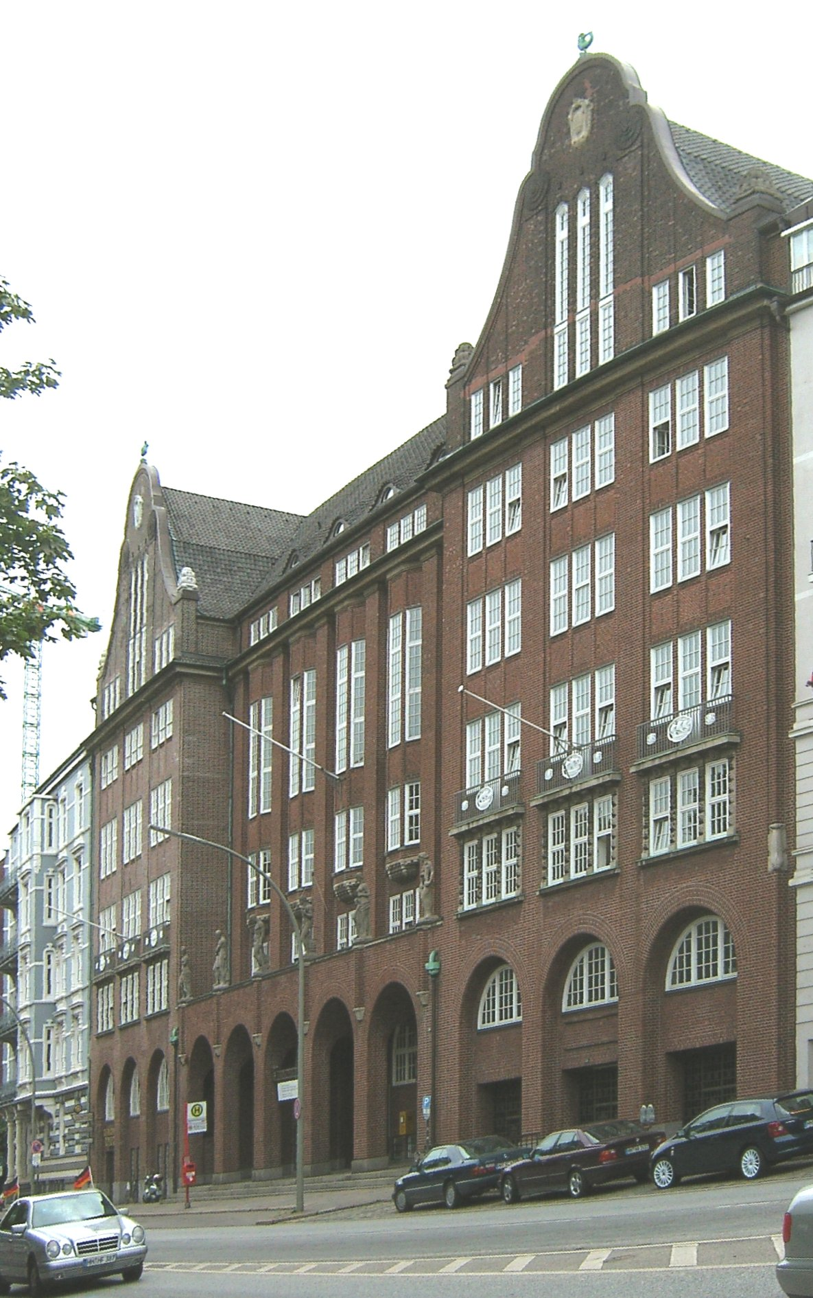 Bildbeschreibung: Hamburg, Neustadt, Handwerkskammer Fotograf: selbst Datum: 28.6.2006